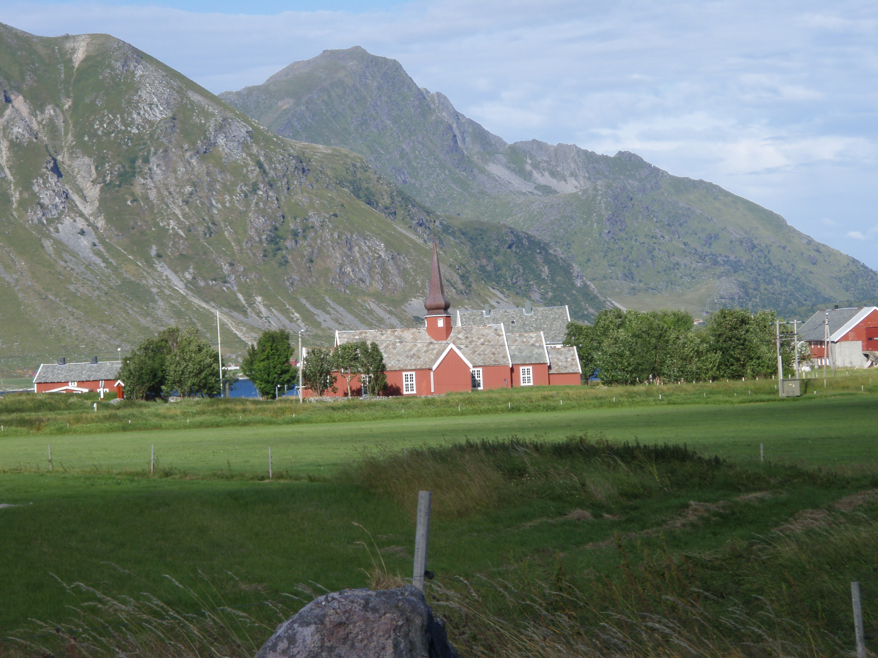 Flakstad kirke, Lofoten, Norway